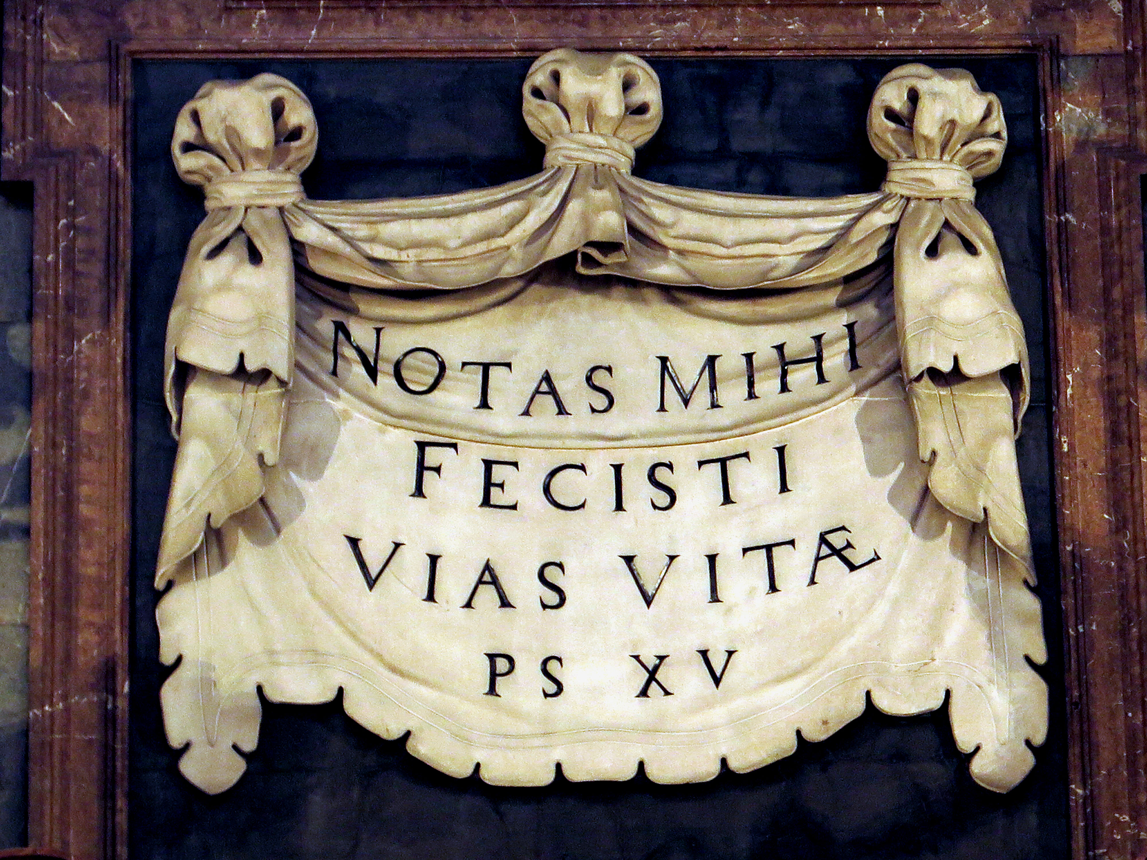 Psalminschrift über Hauptaltar vom Dom zu Salzburg aus Psalm 15,11 der Vulgata. - Psalm 15 der Vulgata entspricht Psalm 16 in der hebräischen Bibel und den dieser folgenden deutschen Bibelübersetzungen. Der Vers lautet im Context mit dem vorherigen Vers: Quoniam non derelinques animam meam in inferno non dabis sanctum tuum videre corruptionem, notas mihi fecisti vias vitae adimplebis me laetitia cum vultu tuo delectatio in dextera tua usque in finem. Zu deutsch nicht allzu professionell übersetzt: Denn du gibst mich nicht dem Totenreich preis, dein Frommer wird die Verwesung nicht sehen. Du zeigst mir den Weg, der zum Leben hinführt. Und wo du bist, hört die Freude nie auf. Aus deiner Hand kommt ewiges Glück.